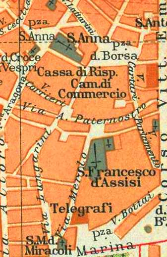 Mapa centrální části Palerma